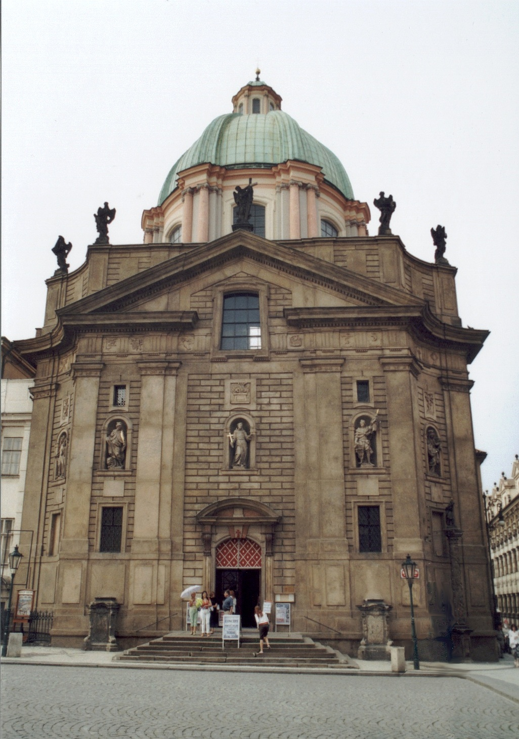 Česky: Kostel svatého Františka serafinského, Praha, Staré město, J. B. Mathey 1679 – 1689